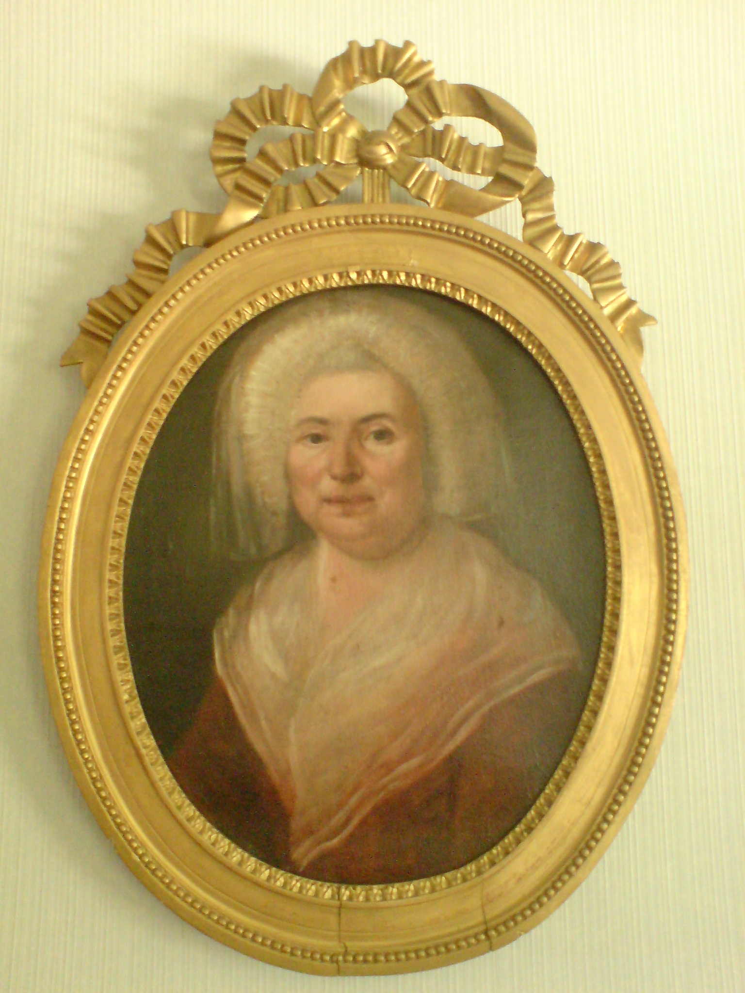 Il s'agit du portrait de Marie-Richard, une bourgeoise de la ville de Lure, réalisé avant le XXème siècle.